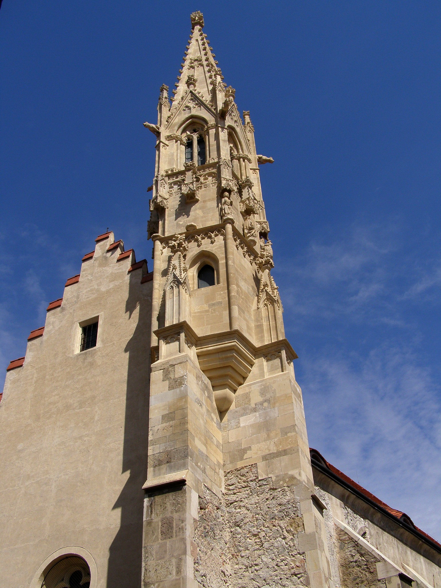 Veža kostola klarisiek v Bratislave